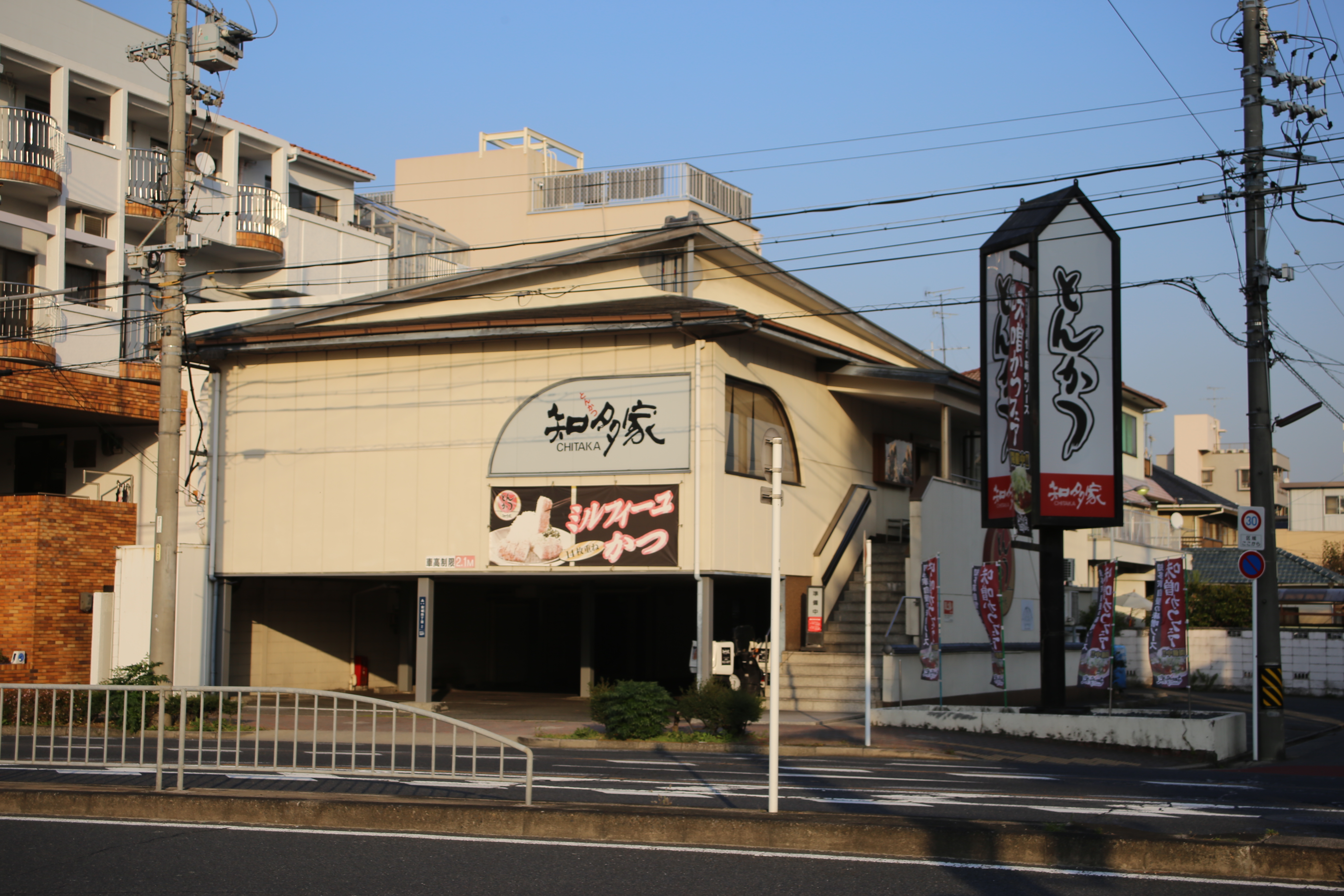 名古屋市北区のとんかつ知多家城北店